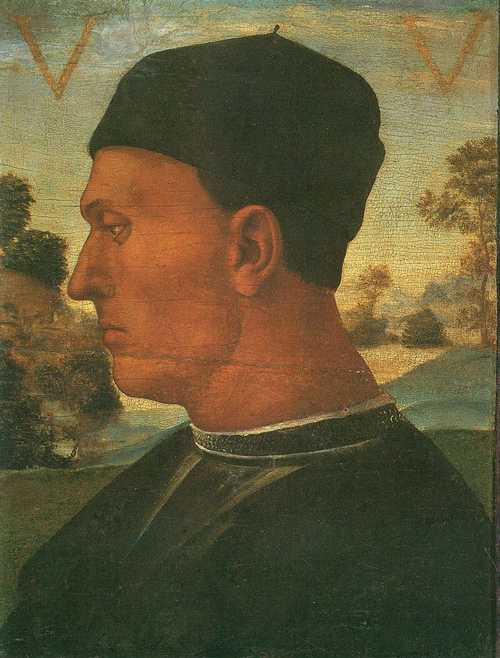 Tableau representant Vitellozzo Vitelli-Conndottiere-Italie